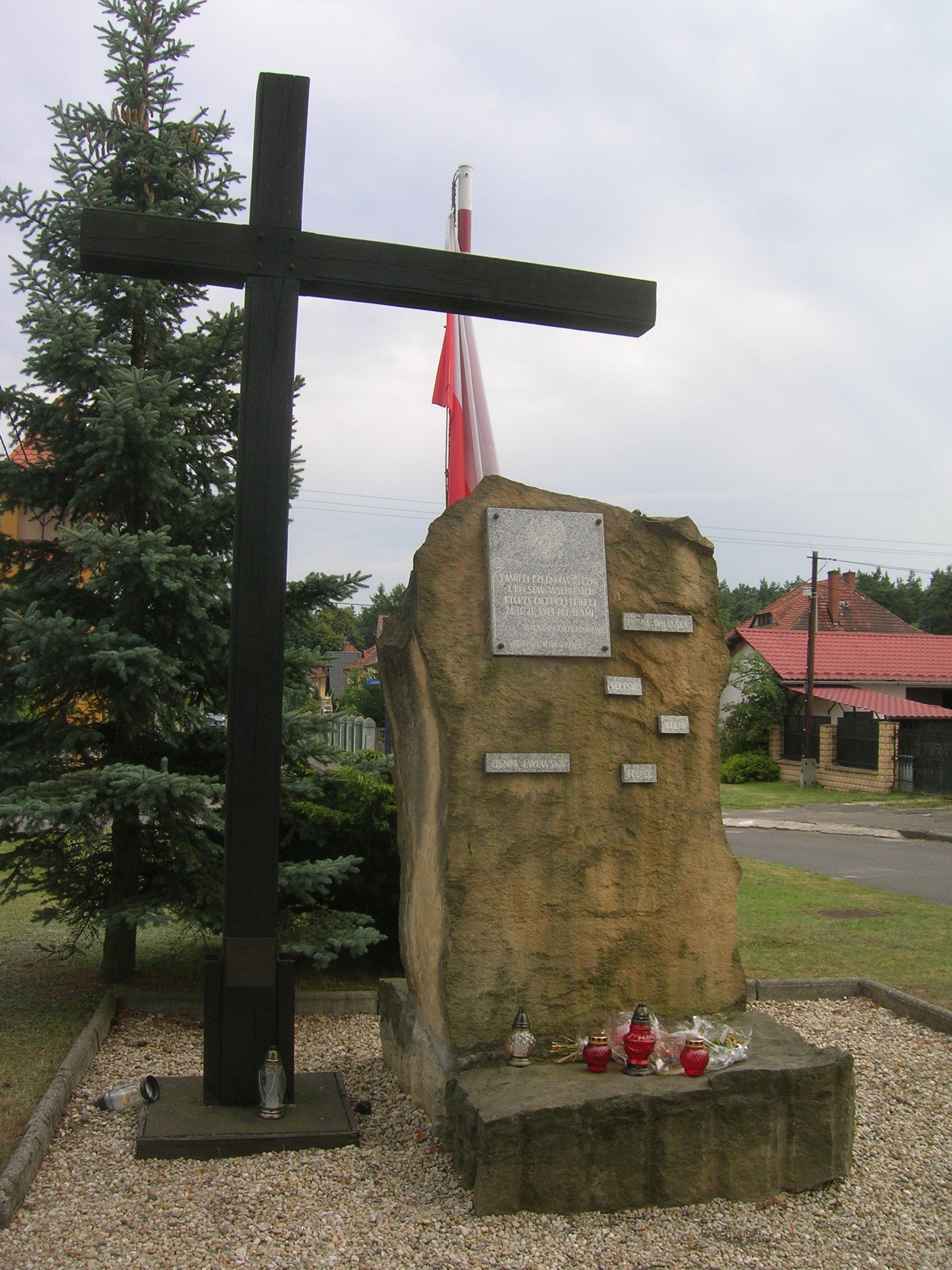 Pomnik Kresów w Węglińcu